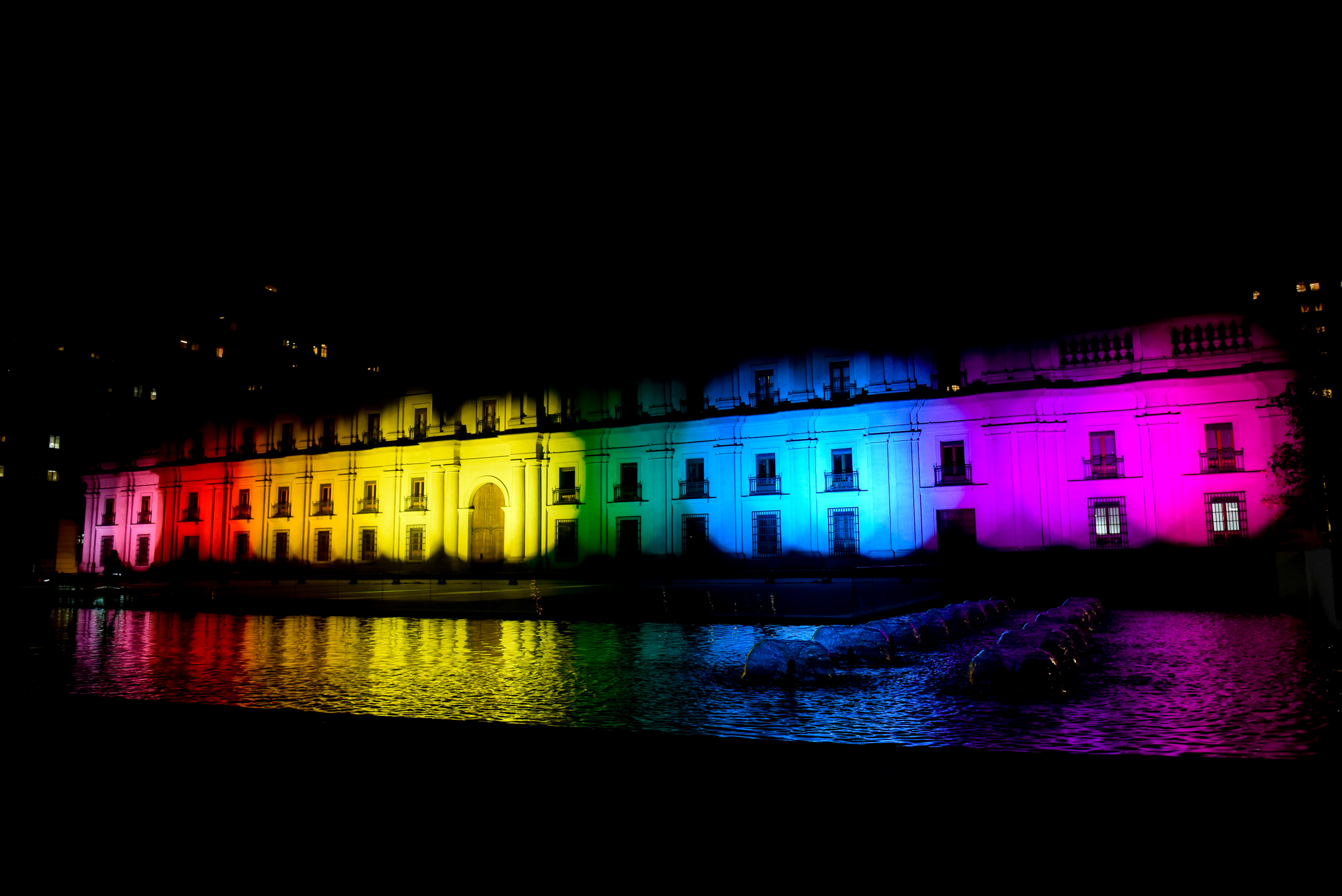 La Moneda se ilumina en el Día contra la Homo y Transfobia